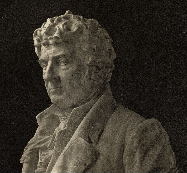 Agrandissement d'une partie d'une héliogravure de Félix Thiollier d’après un buste Antoine-Pierre Aubert